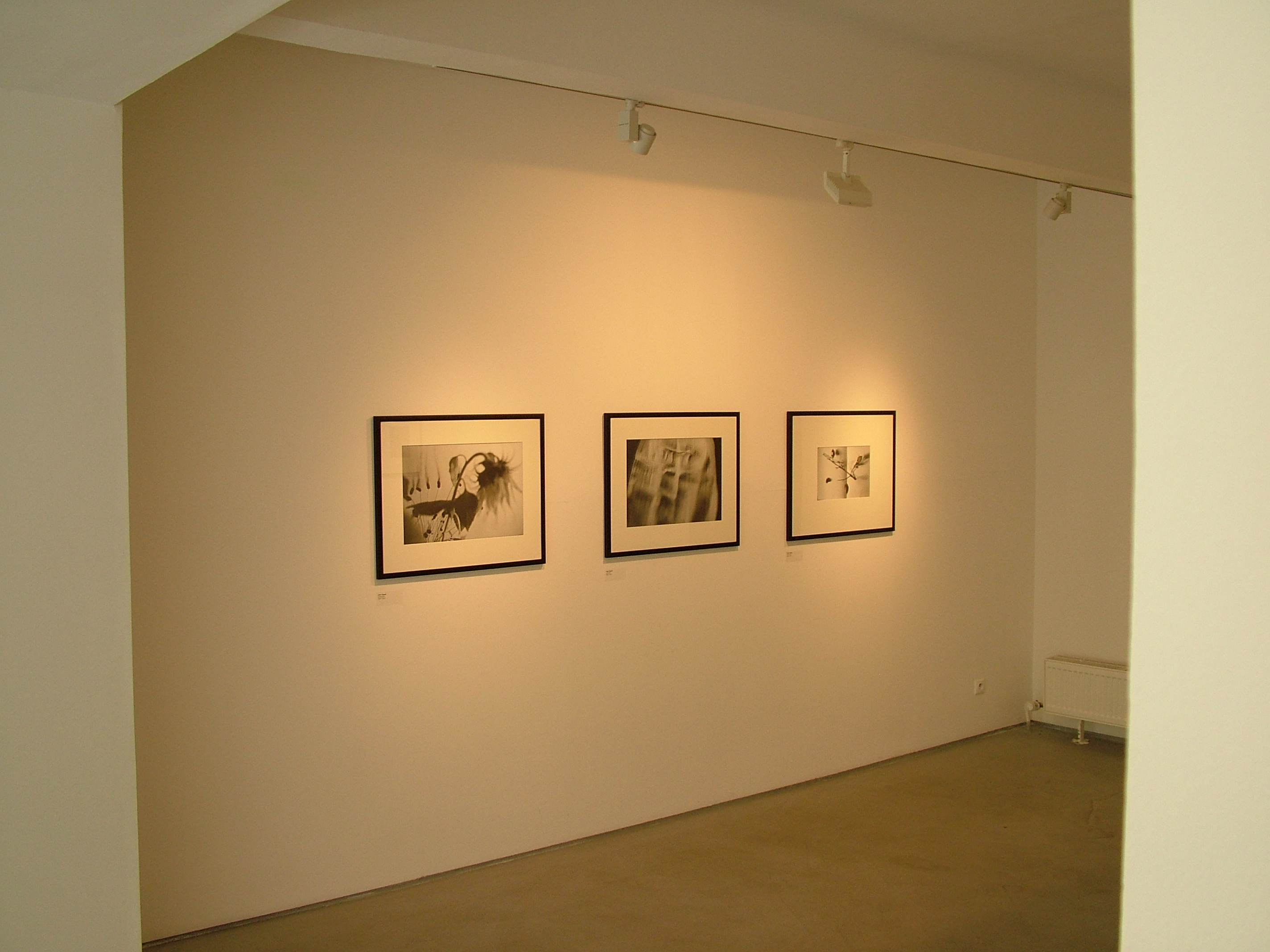 Výstava Obrazy z dějin fotografie české v Galerii Václava Špály, 2011 Praha